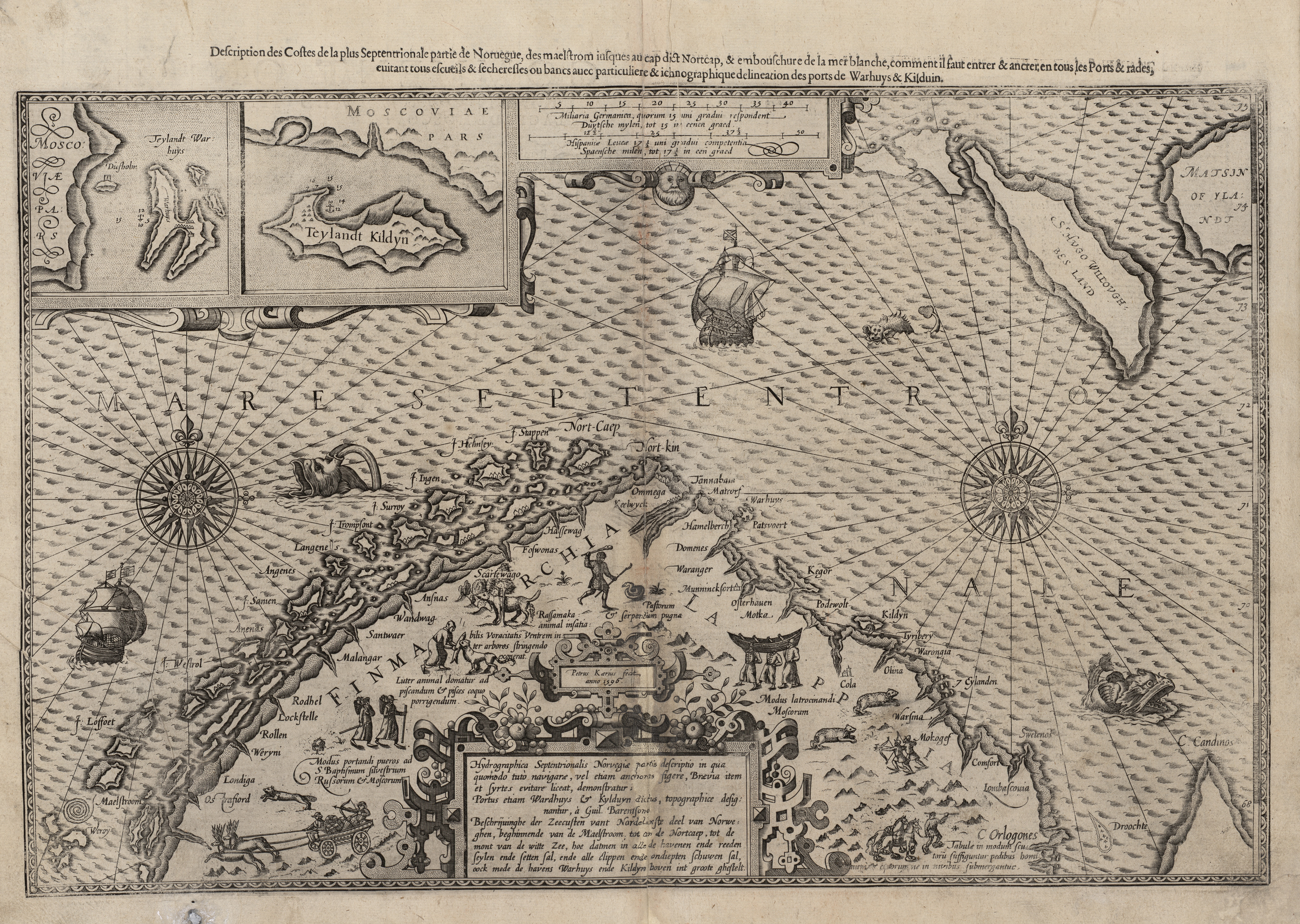 Kart fra Nasjonalbibliotekets kartsamling. Kartet er gitt ut i (1605 [1596]) og viser Finnmark.